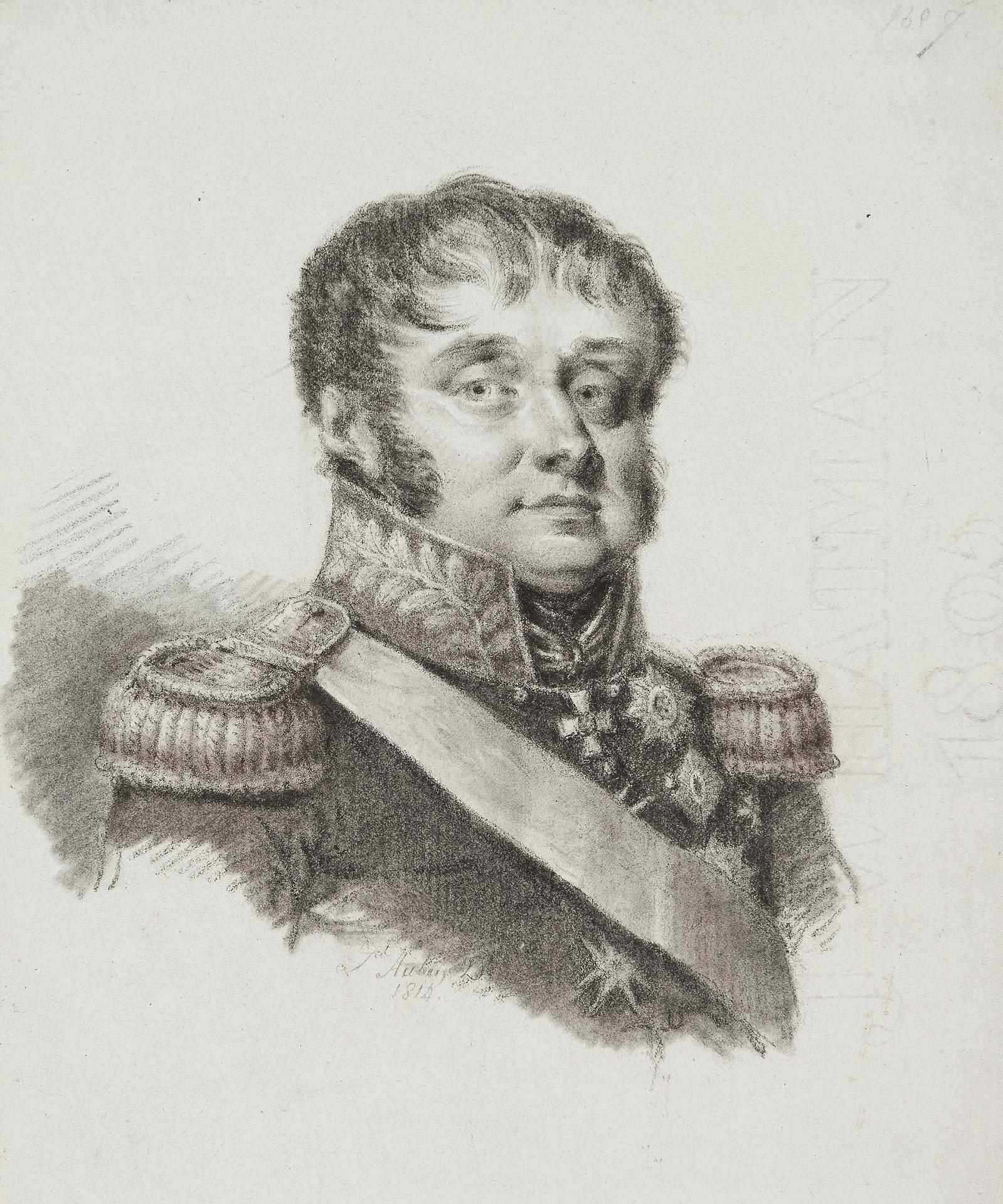 Портрет генерала от кавалерии герцога Александра-Фридриха-Карла Вюртембергского